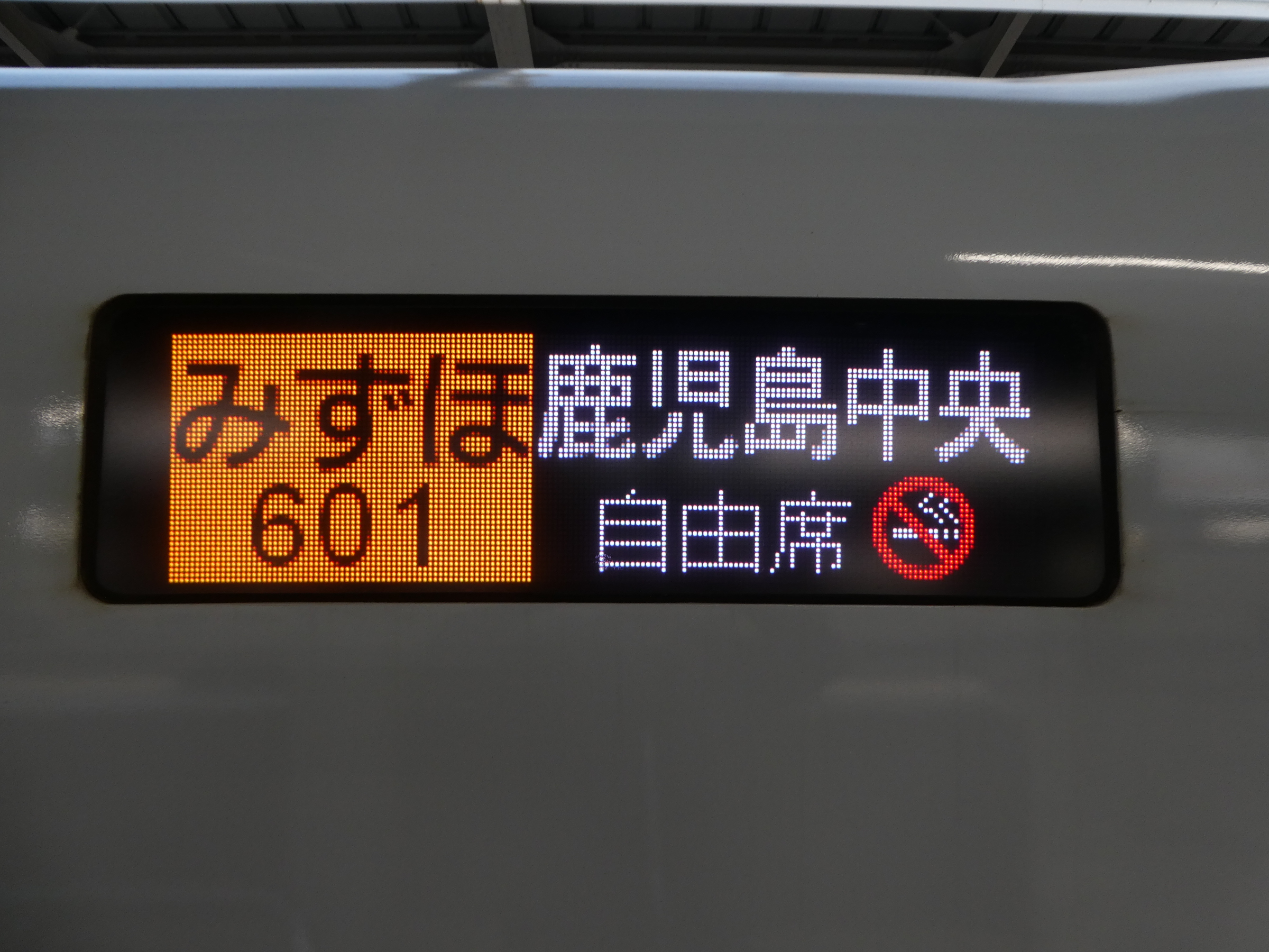 新幹線みずほ号側面LED